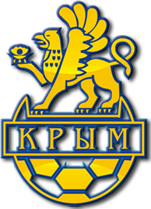 Емблема Федерації футболу АР Крим